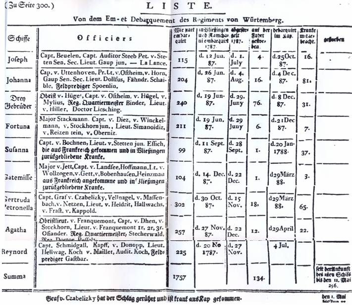 Liste der Verschiffung des Kapregiments nach Afrika 1787/1788